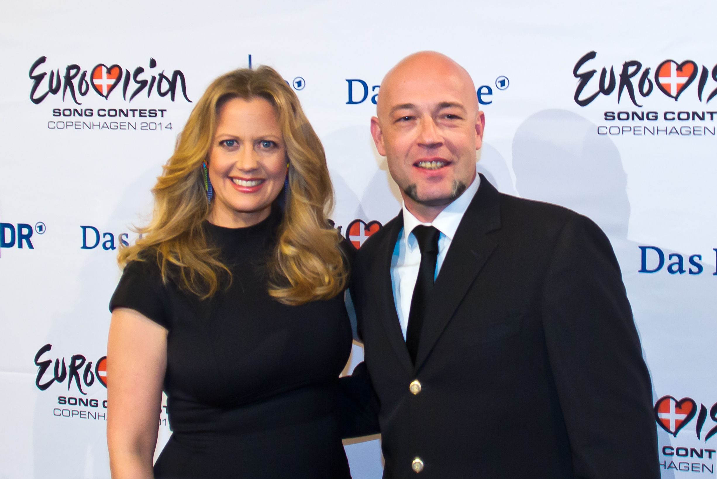 Pressekonferenz am 2. Probentag von Unser Song für Dänemark mit allen 8 ActsFoto: Moderatorin Barbara Schöneberger und Der Graf der Gruppe Unheilig